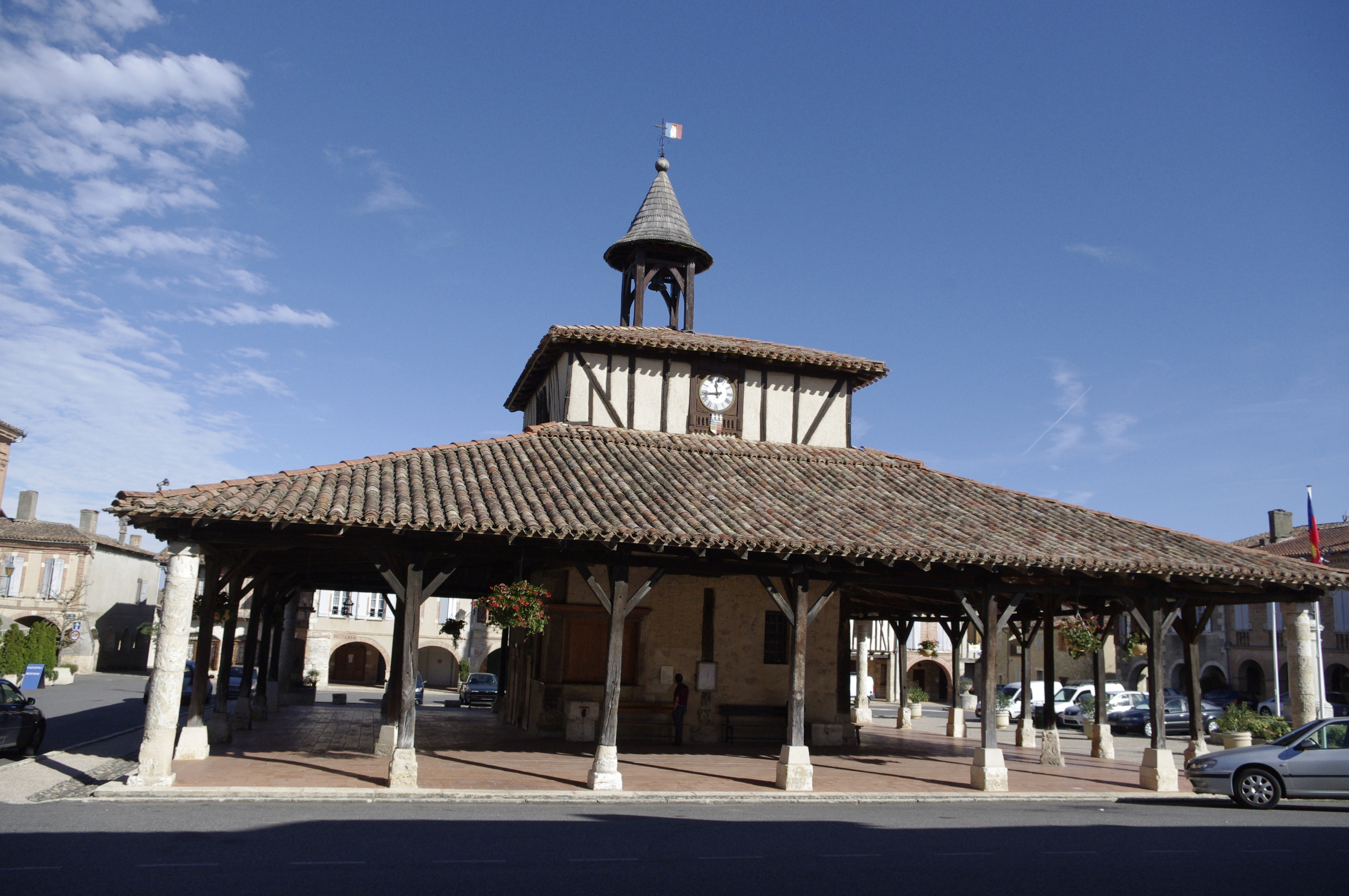 Cologne dans le Gers, France. - Halle et place.